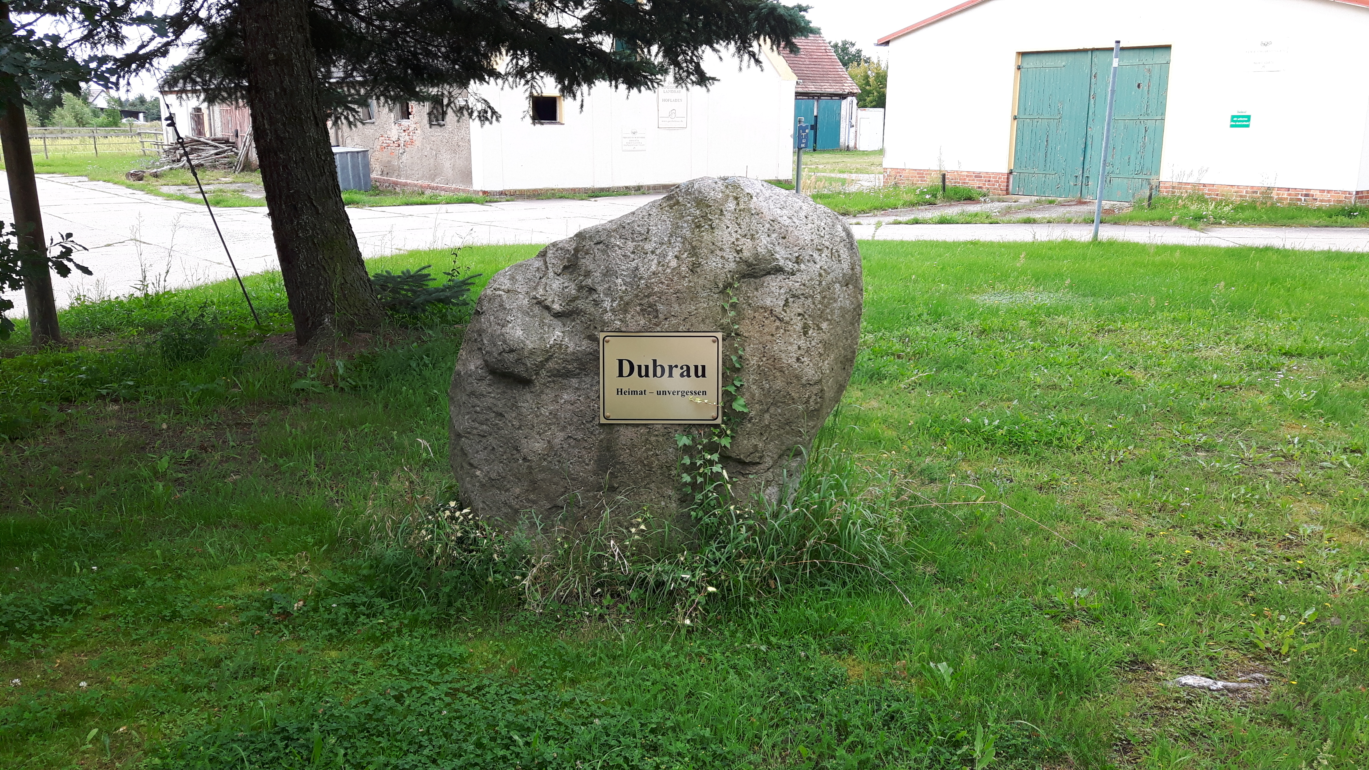 Gedenkstein an das abgebrochene Dorf Dubrau auf dem ehemaligen Dorfplatz.